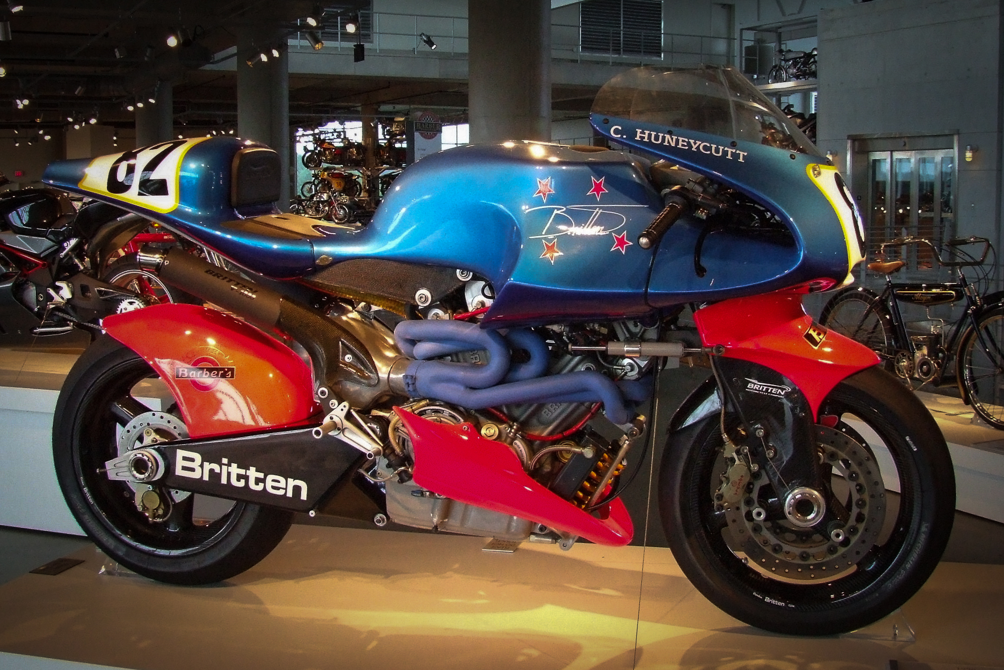 Britten V-1000 (1996) im Barber Vintage Motorsports Museum, Birmingham Alabama USA